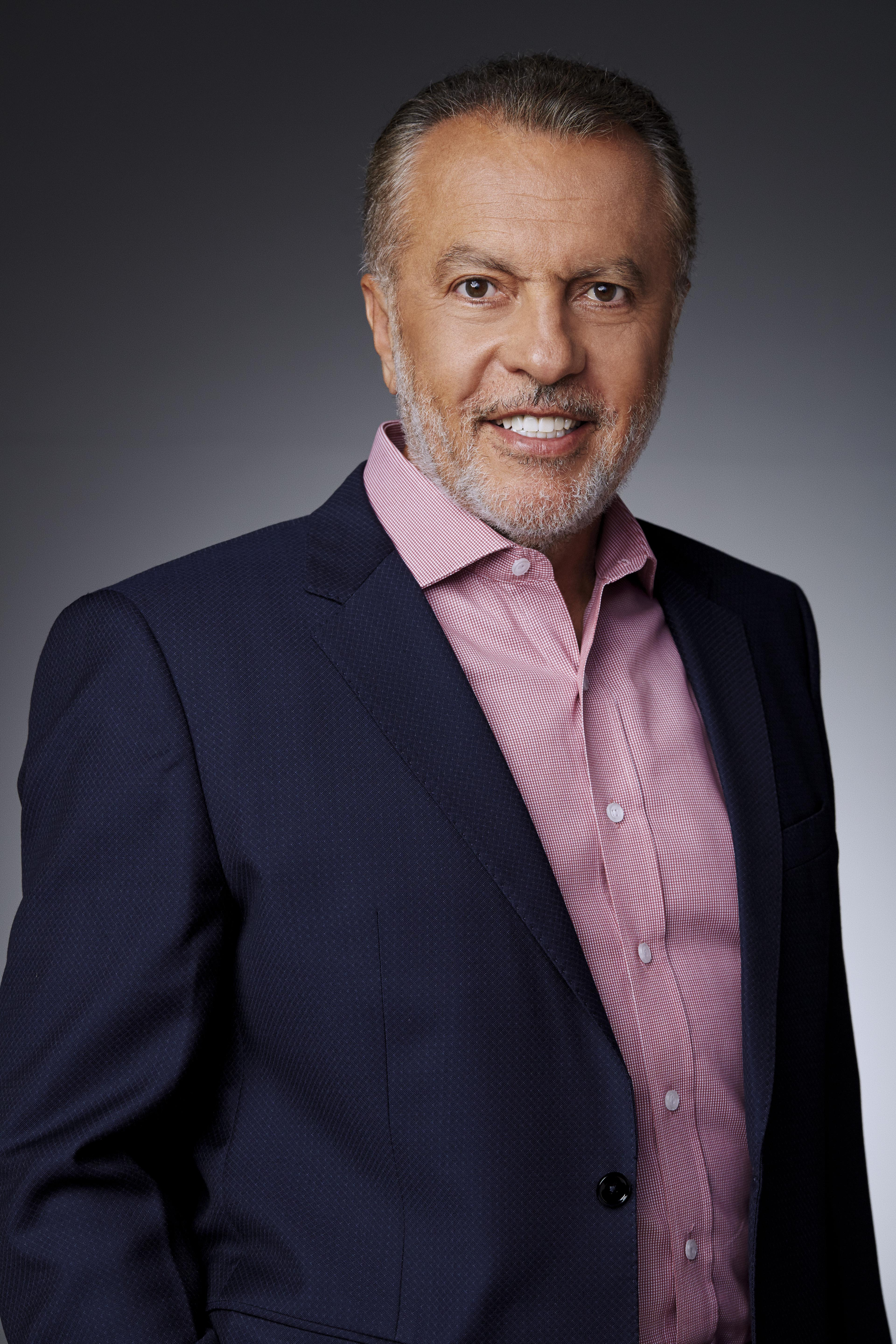 Foto Paulo Giovanni